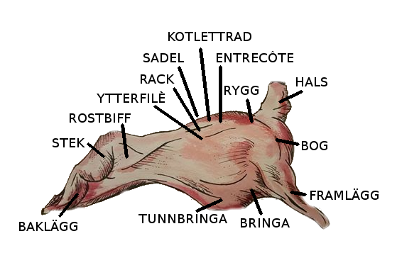 Slaktkropp av lamm med viktiga styckdetaljer markerade. Cuts of lamb in Sweden.